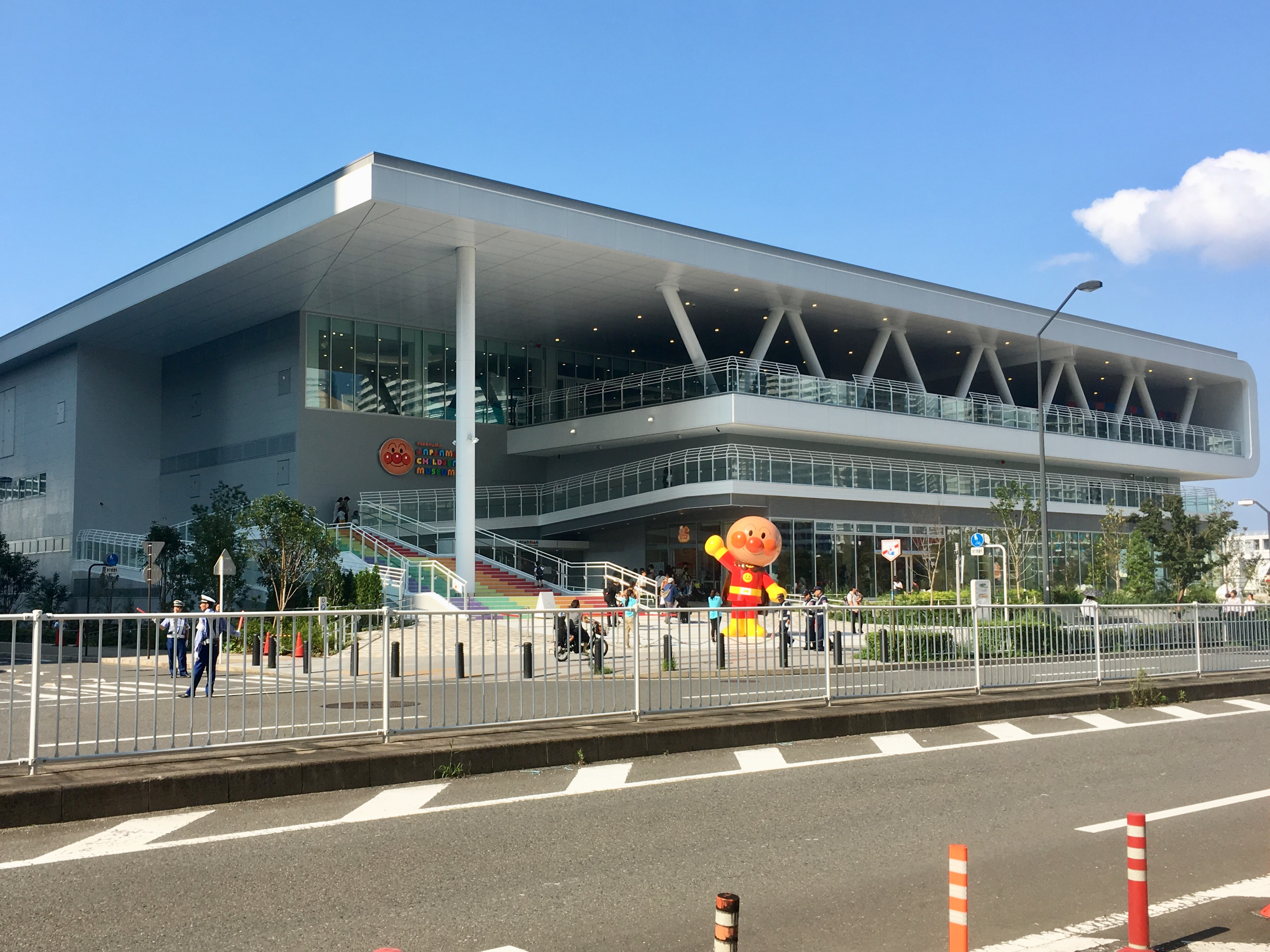 2019年に移転リニューアルオープンした横浜アンパンマンこどもミュージアムの外観。